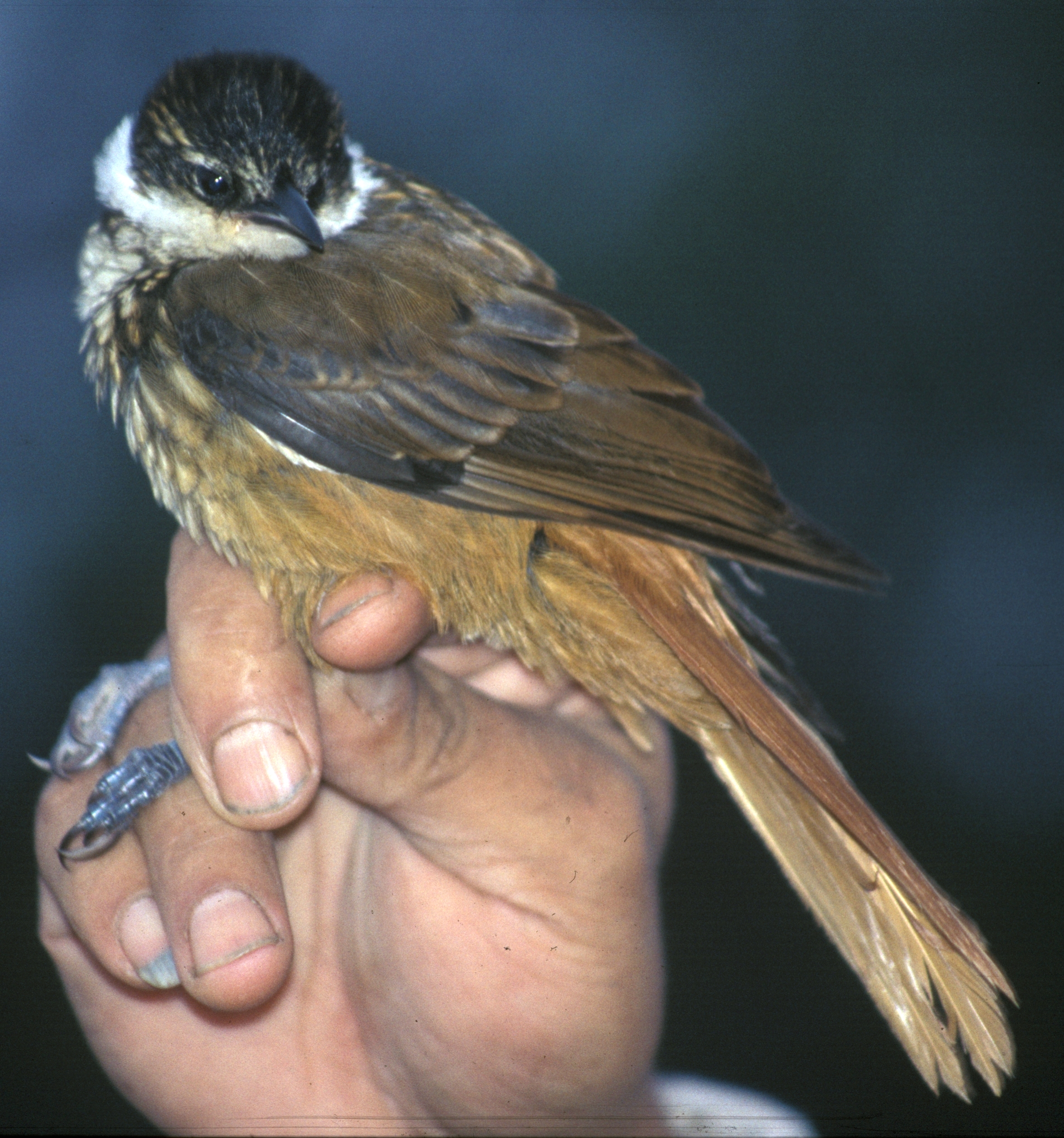 (Pseudocolaptes boissonneautii) in Ecuador